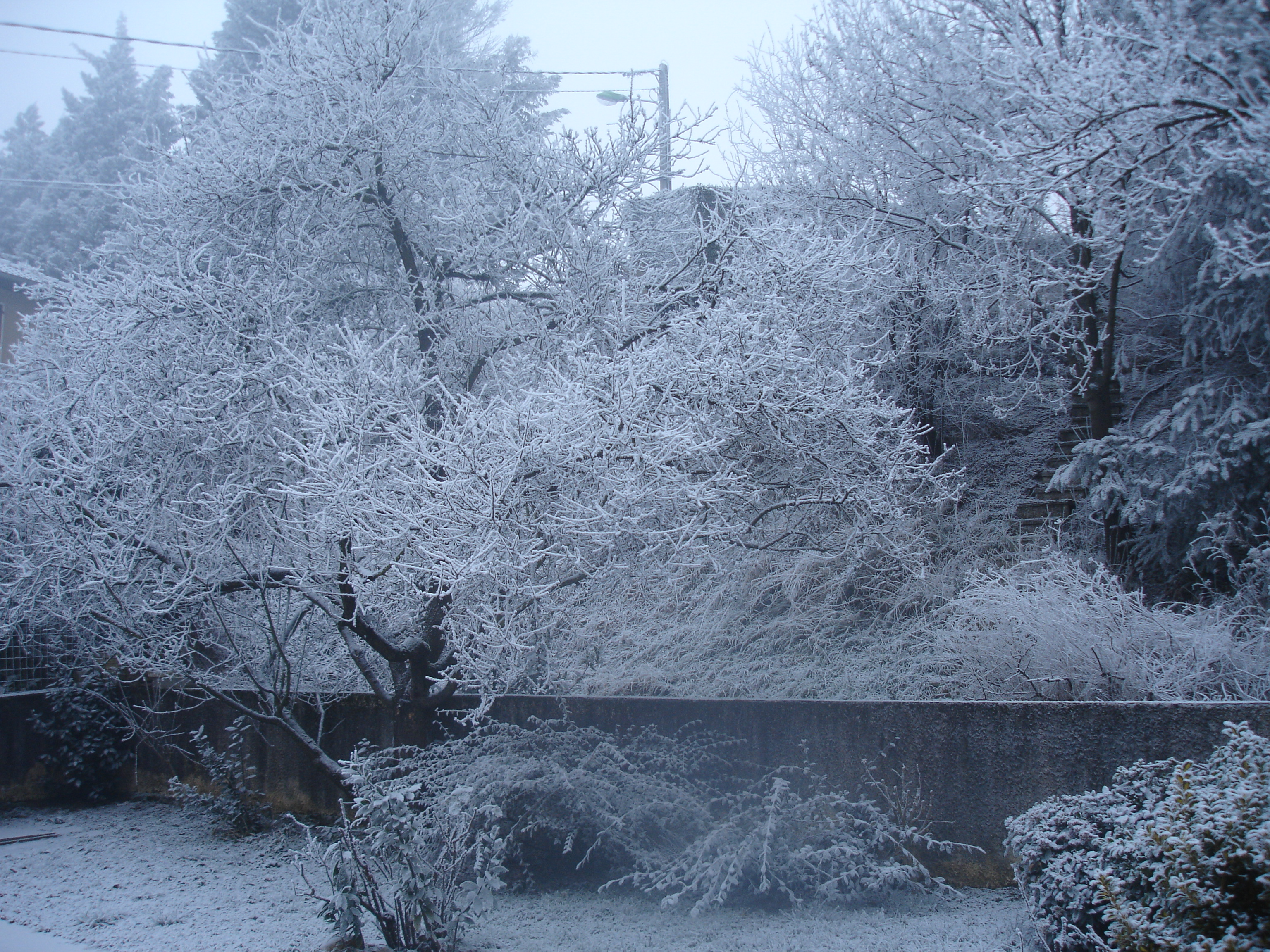 Arbres givrés sur les hauts de Feyzin (Rhône)